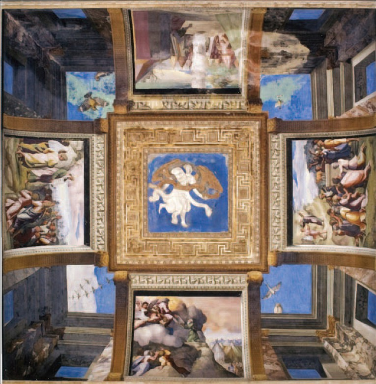 Nona volta - Storie di Mosè e Giosuè